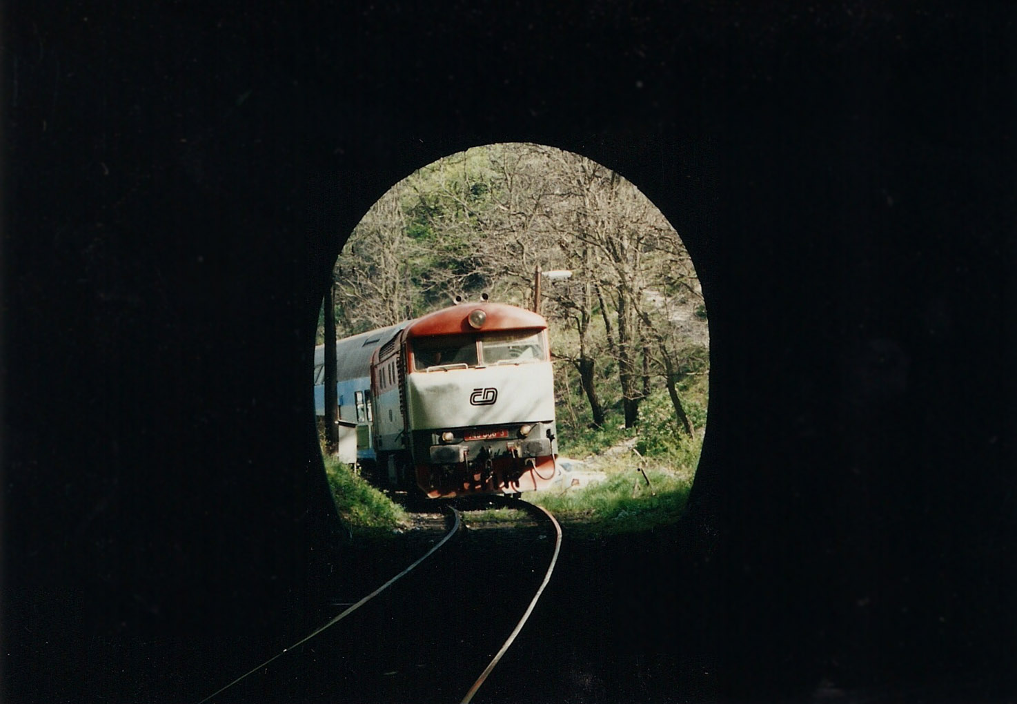 Jarovský tunel zevnitř - 749.006